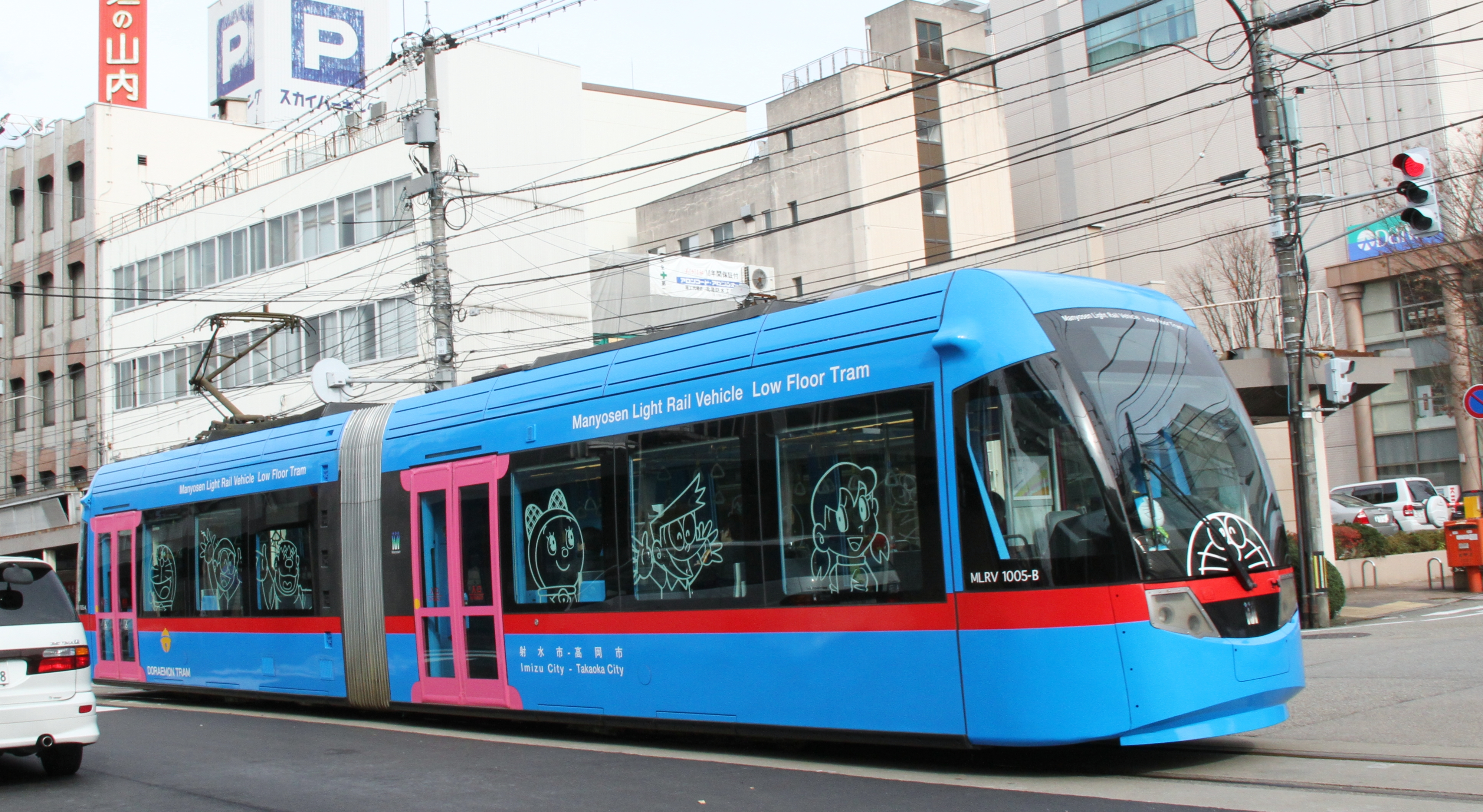 万葉線1000形電車 ドラえもんトラム